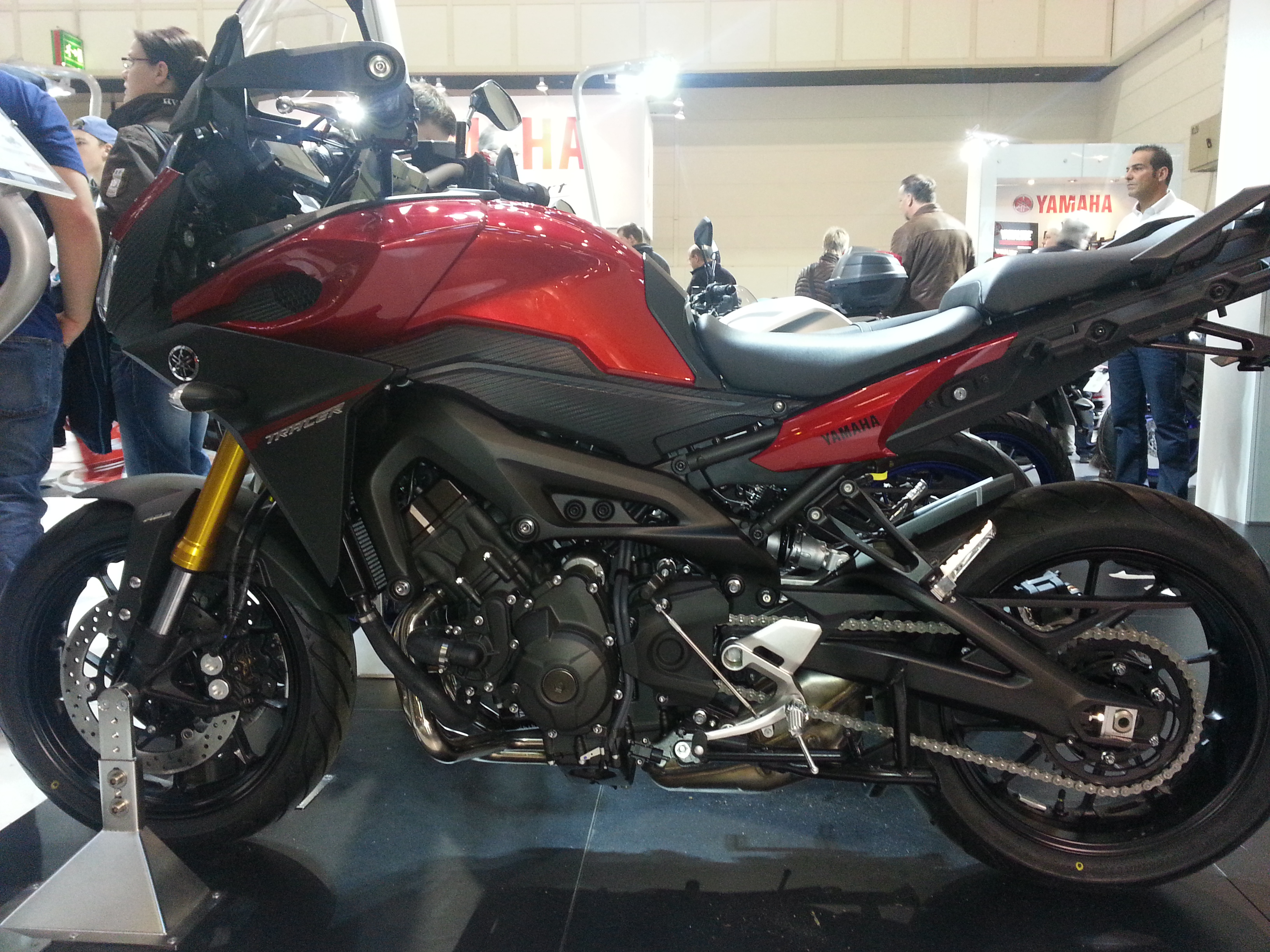 Yamaha MT-09 Tracer - Mod. 2015